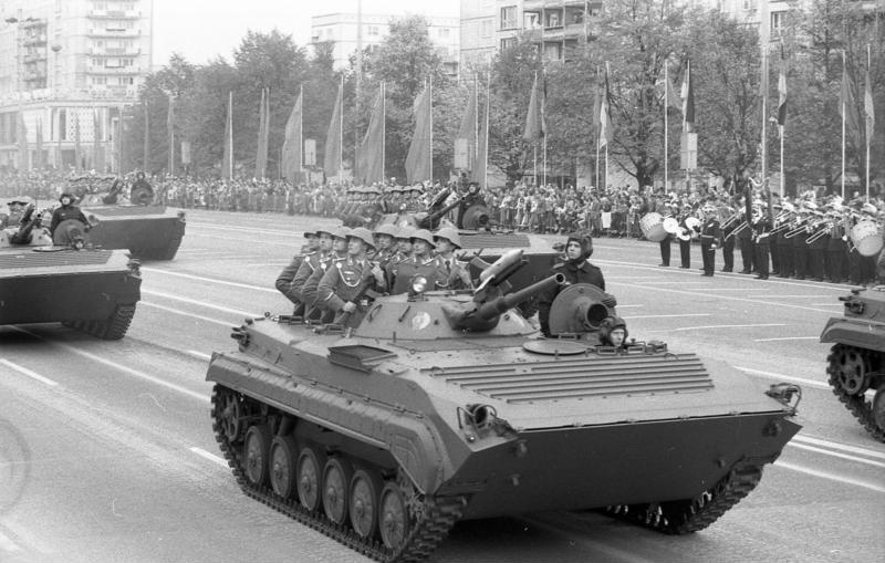 Berlin, 39. Jahrestag DDR-Gründung, Parade ADN-ZB / Mittelstädt / 7.10.88 /Berlin: Jahrtestag - Ehrenparade Anläßlich des 39. Jahrestags der Gründung der DDR fand in der Karl-Marx-Allee eine Ehrenparade der NVA statt. Die Strecke zwischen Strausberger- und Alexanderplatz war erfüllt vom Motorengeräusch moderner Schützenpanzer BMP-1.